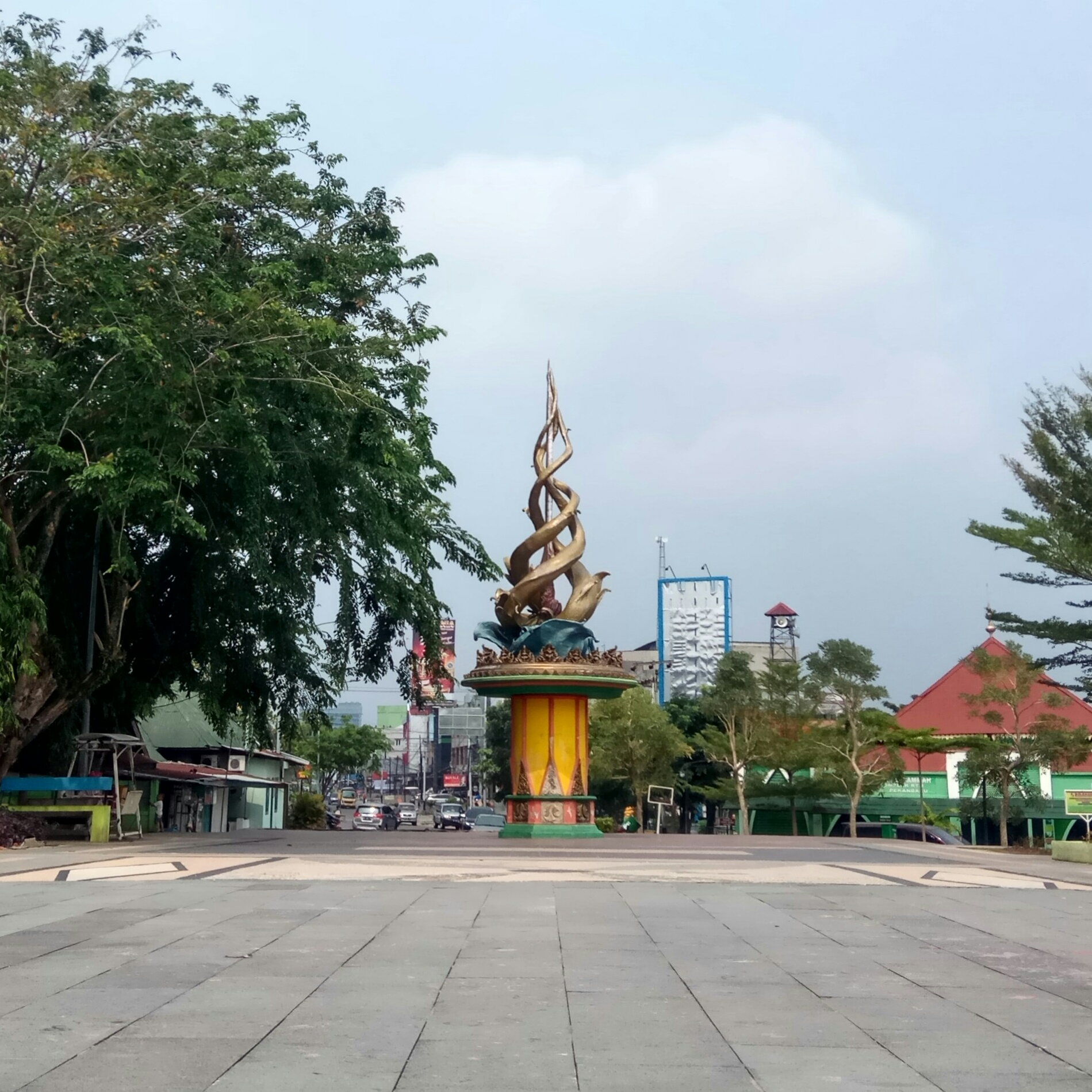 Tugu Antikorupsi Pekanbaru